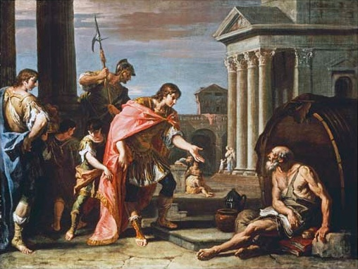 Alexander and Diogenes